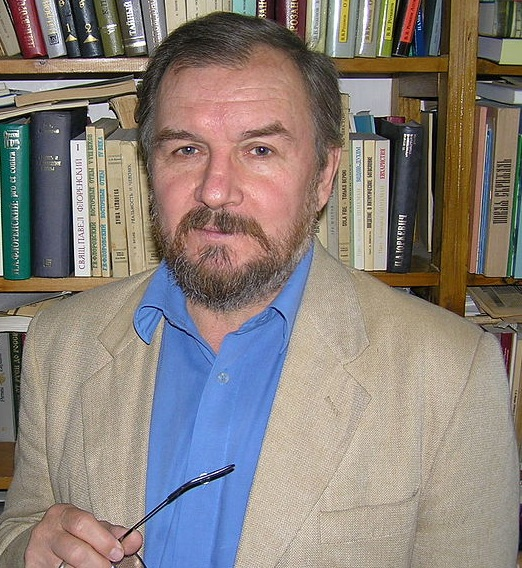 Михаил Викторович Назаров